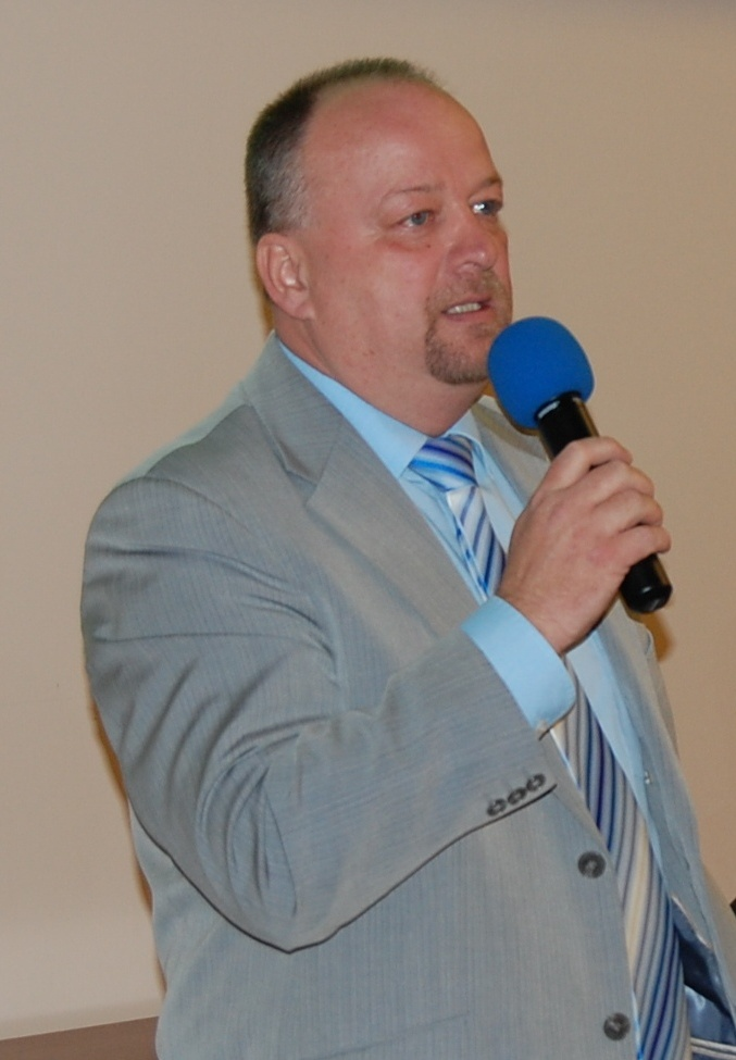 Ivo Polák v roce 2012